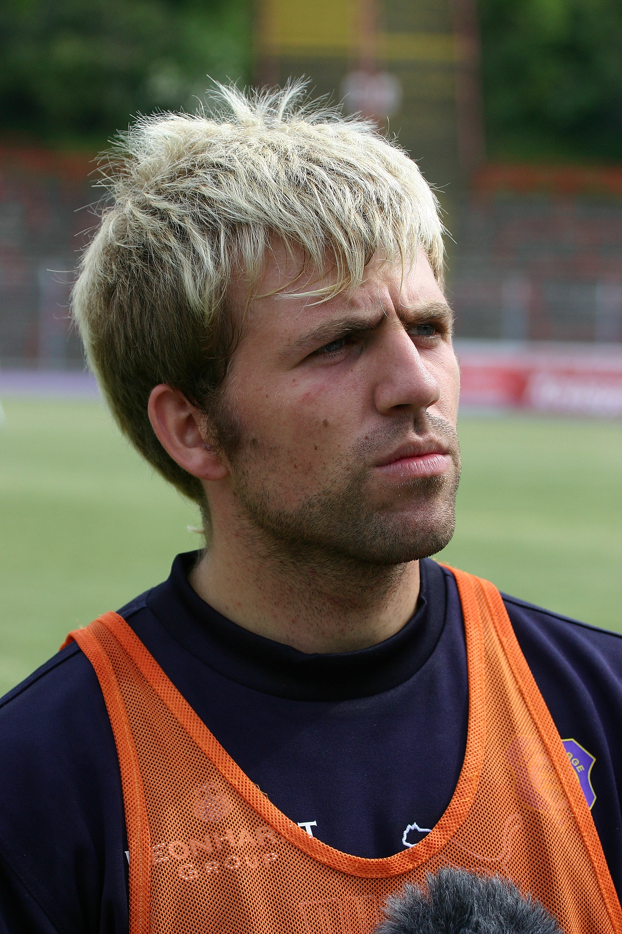 Christian Mikolajczak FC Erzgebirge Aue 2005